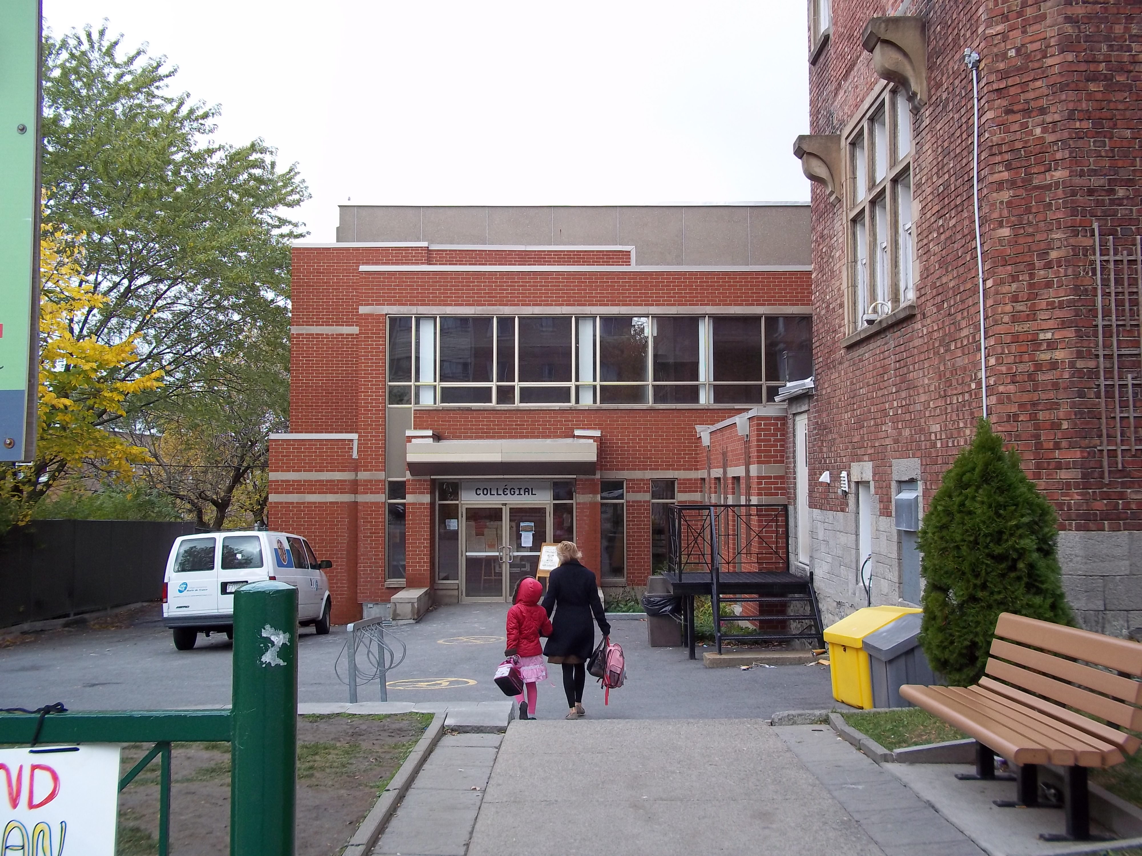 Collège international Marie de France, 4635, chemin Queen-Mary, Montréal. info